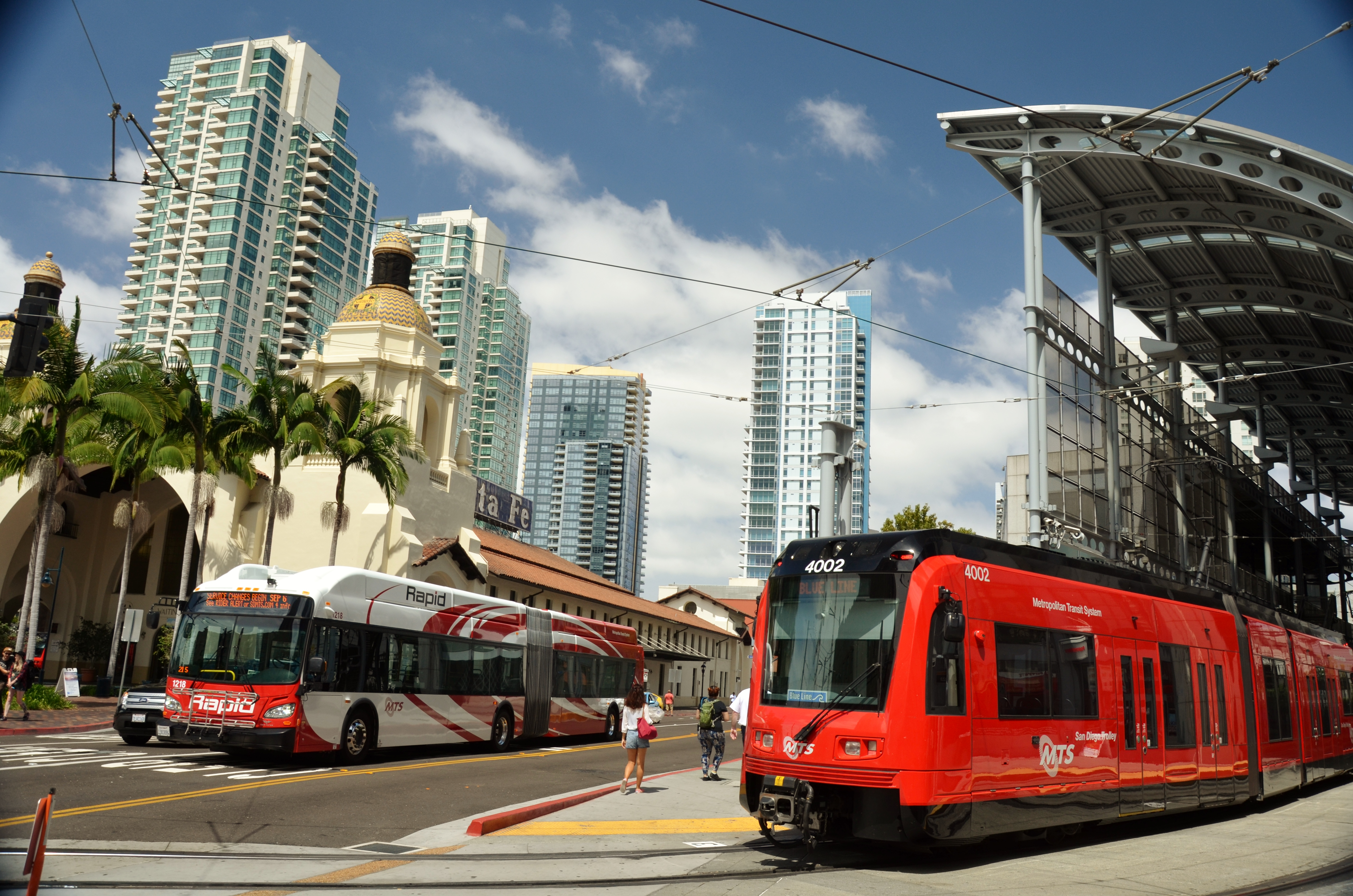 Core-Columbia, San Diego, CA, USA